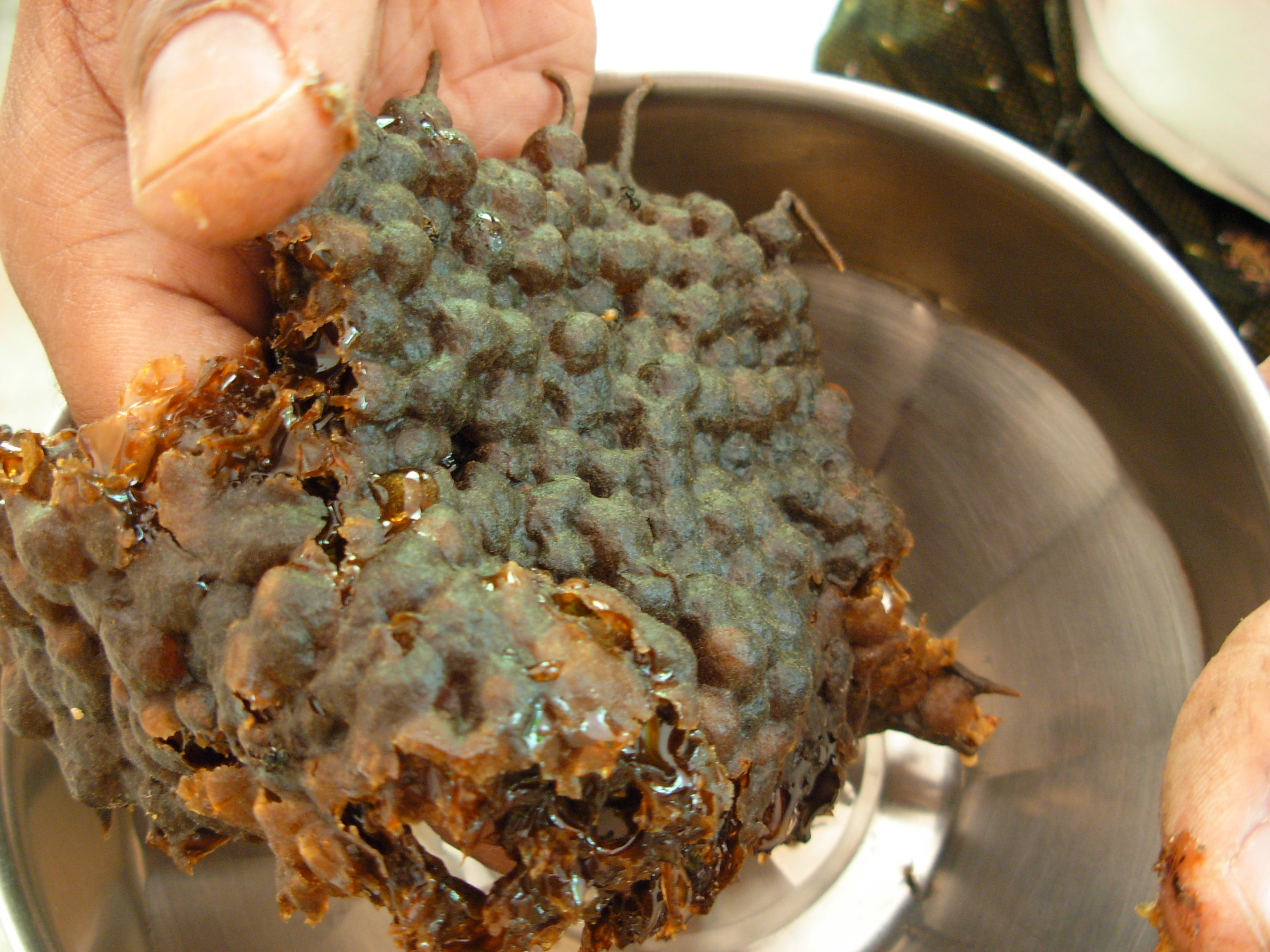 ചെറുതേനീച്ചയുടെ തേൻ കട്ടയുടെ ചിത്രം. ഷഡ്ഭുജ അറകളിൽ തേൻ ശേഖരിക്കുന്ന മറ്റ് തേനീച്ച ഇനങ്ങളിൽ നിന്നു വ്യത്യസ്തമായി ലോലമായ മെഴുക് ആവരണമുള്ള ഉരുണ്ട അറകളിലാണ് ചെറുതേനീച്ച തേൻ സംഭരിക്കുന്നത്. ഈ തേൻ കട്ടകൾ പിഴിഞ്ഞ് തേൻ വേർ‍തിരിച്ചെടുക്കുന്നു.